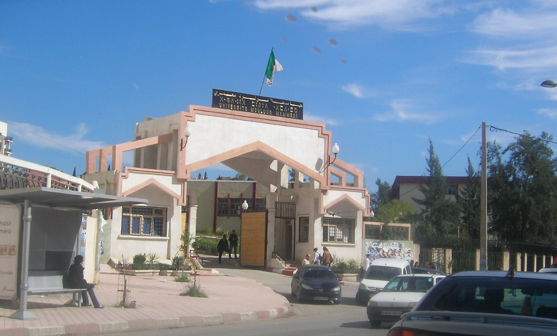 sam leham tizi-ouzou